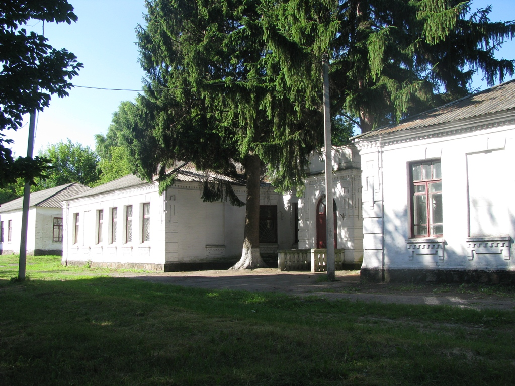 Приміщення Моринської середньої школи